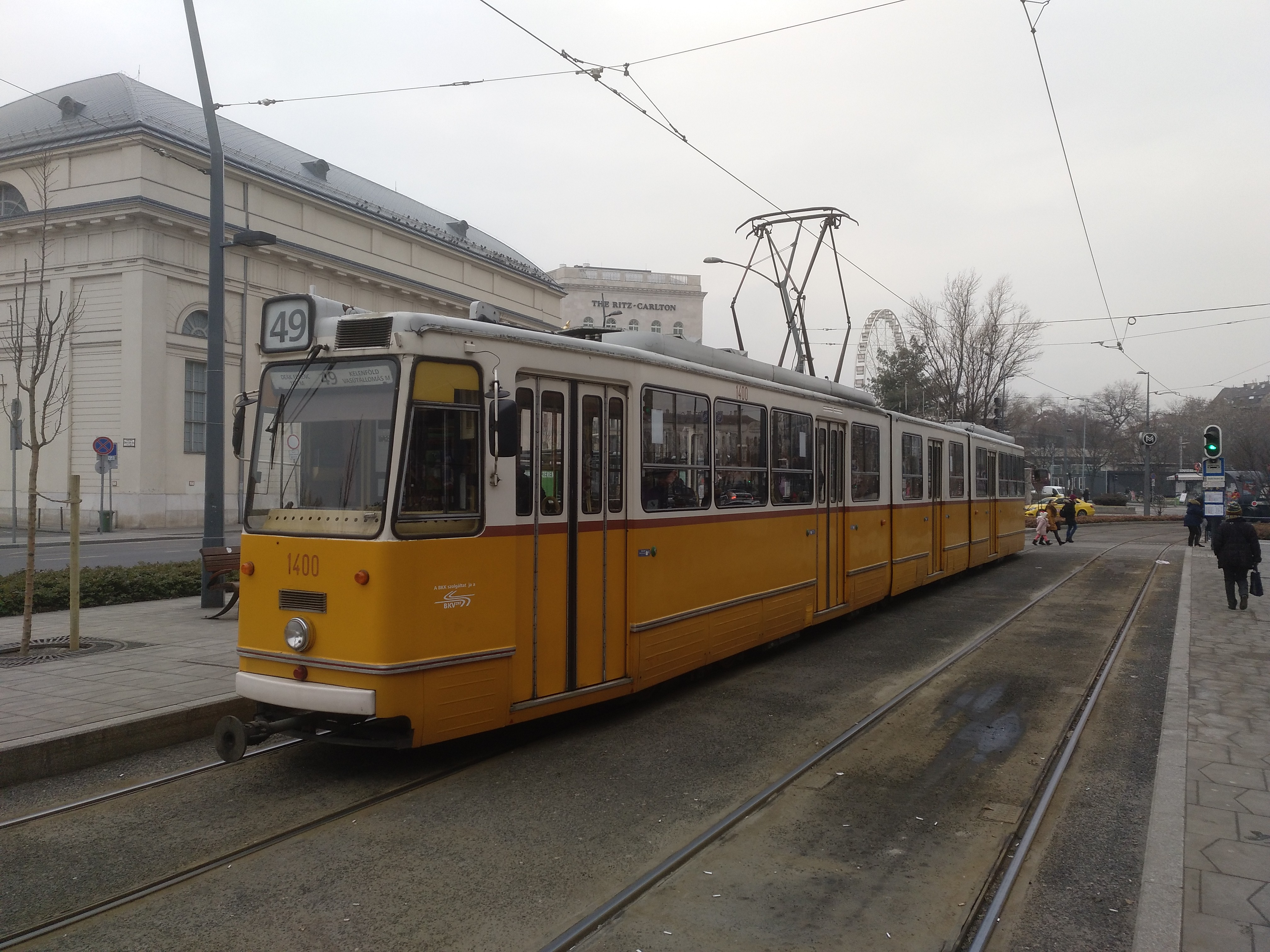 Tranvía de Budapest fotografiado en 2019.